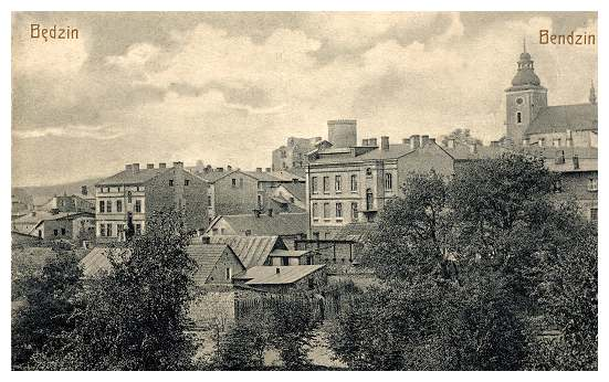 Będzin na starej pocztówce. Widok ogólny od strony ulicy Modrzejowskiej (początek XX wieku)